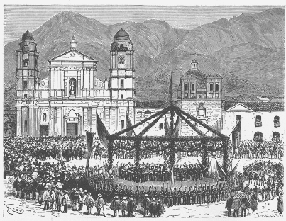 Celebración de la independencia en la Catedral de Bogotá. Geografia pintoresca de Colombia: viaje de Edouard André (1875-1876).